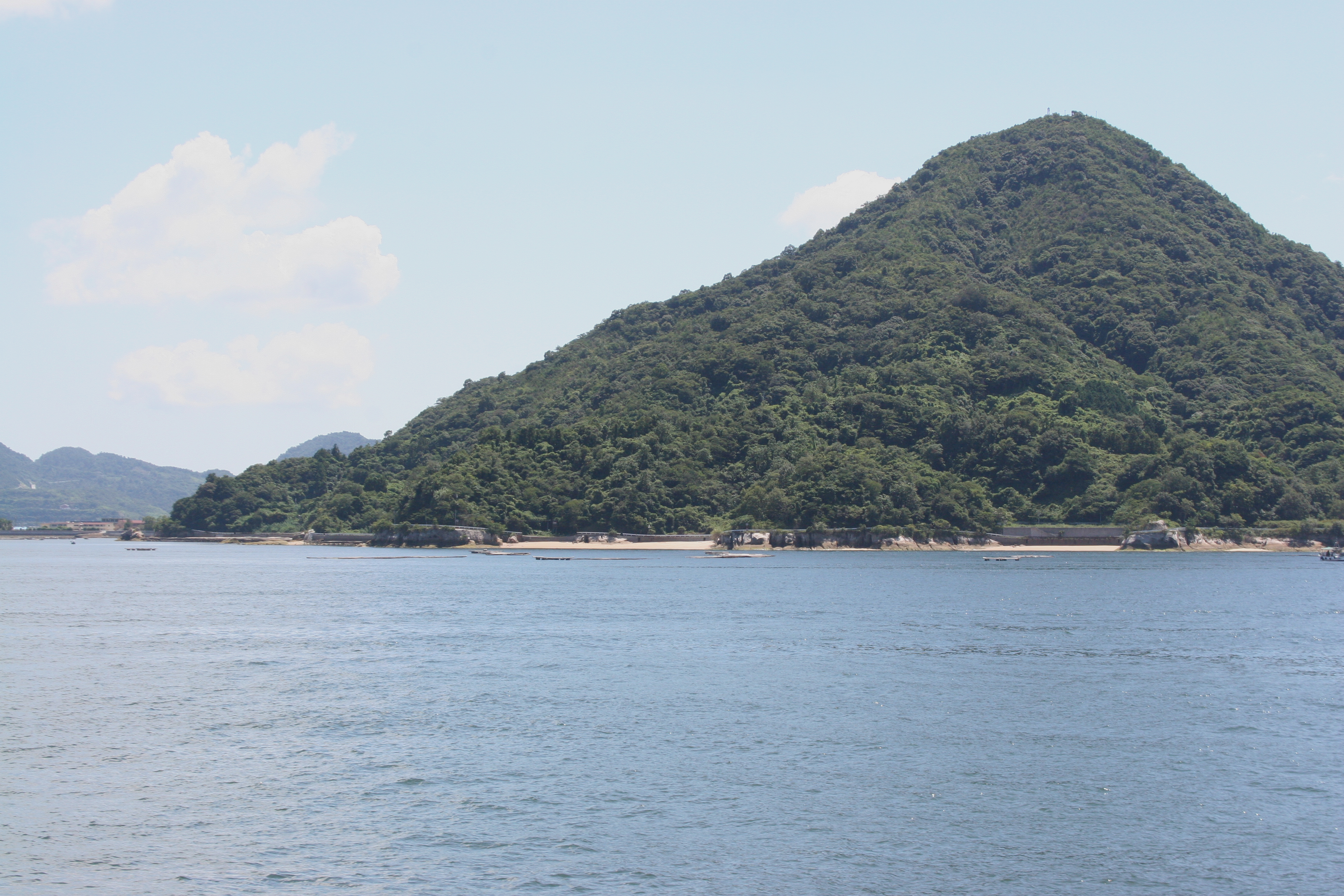 Aki-no-kofuji, Ninoshima Island, Japan